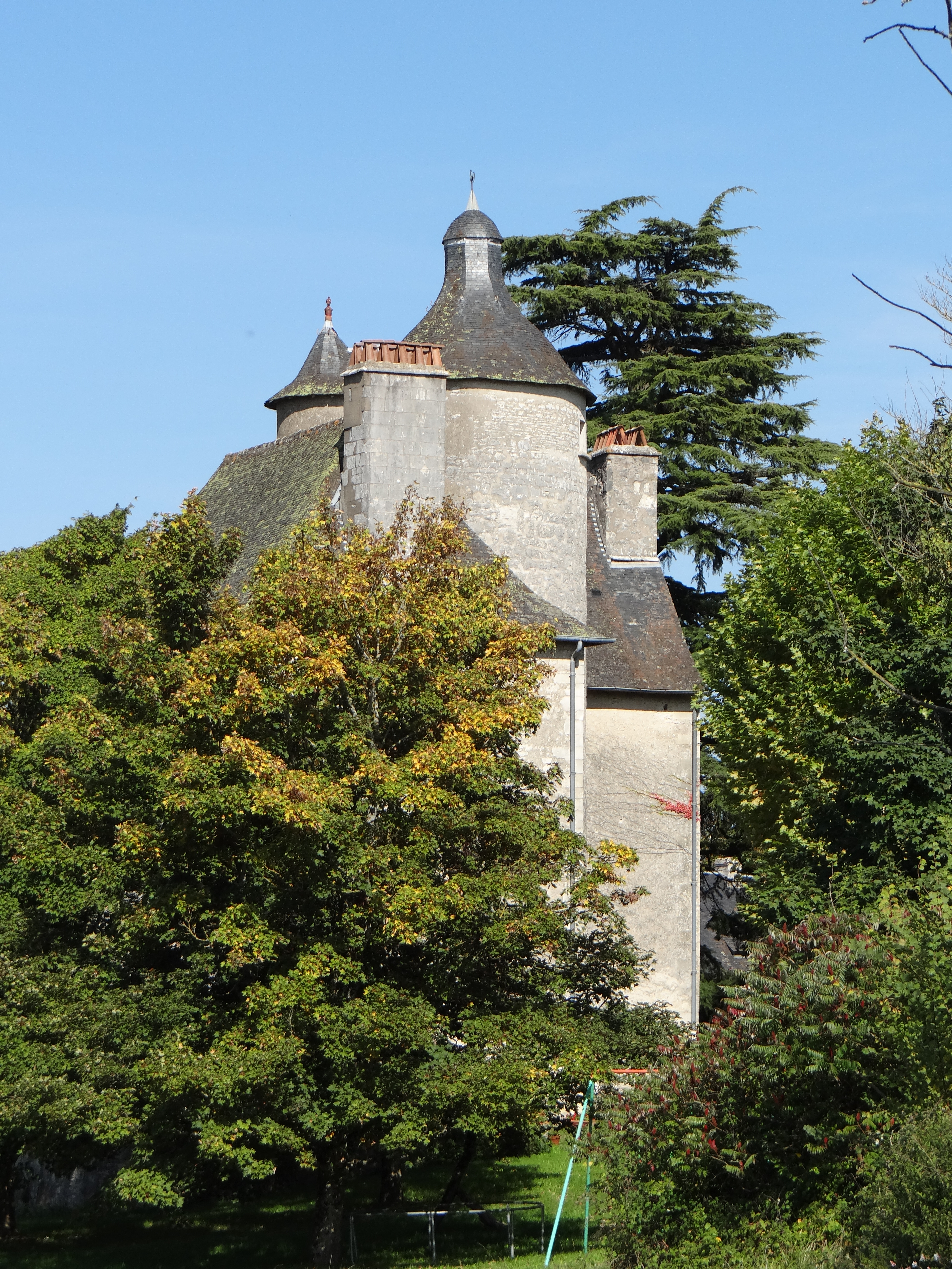 Corps de logis du château de Mayrac (Lot, France), XV° siècle, prise du côté sud, début d'automne